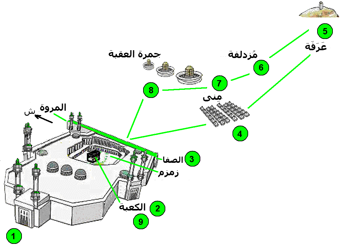 مناسك ومراحل الحج في الإسلام.